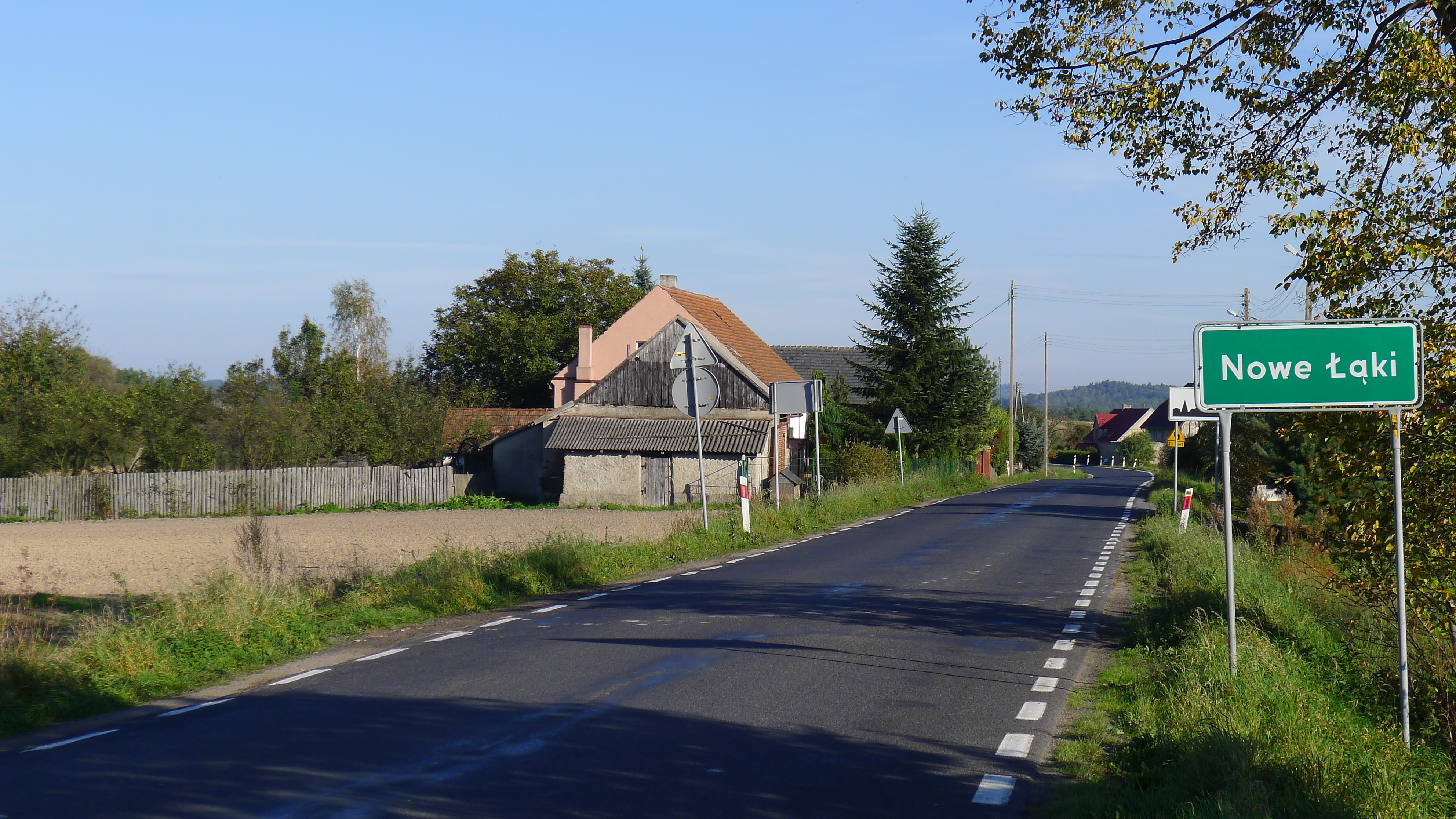 Nowe Łąki - widok od strony Czapli